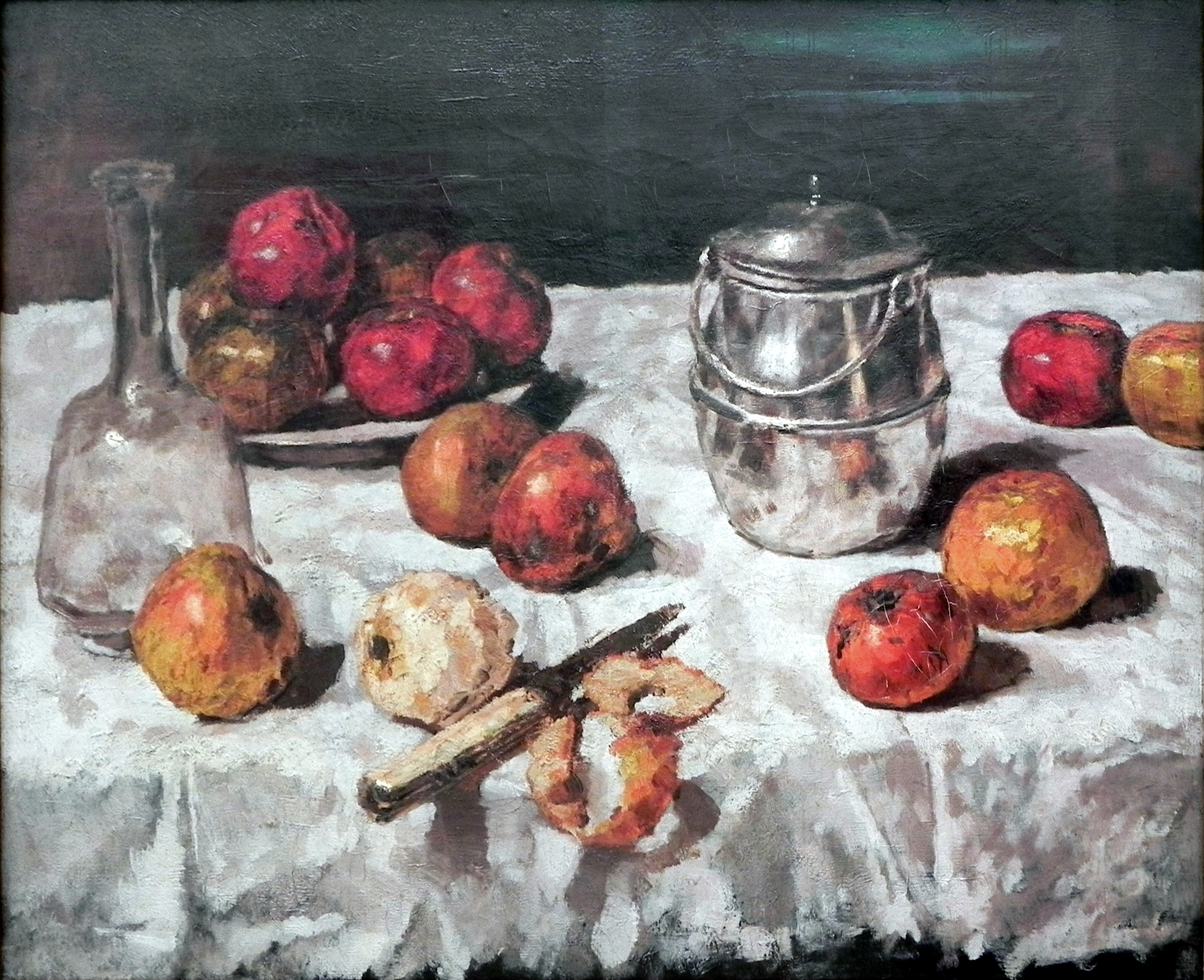 Stilleben mit Äpfeln